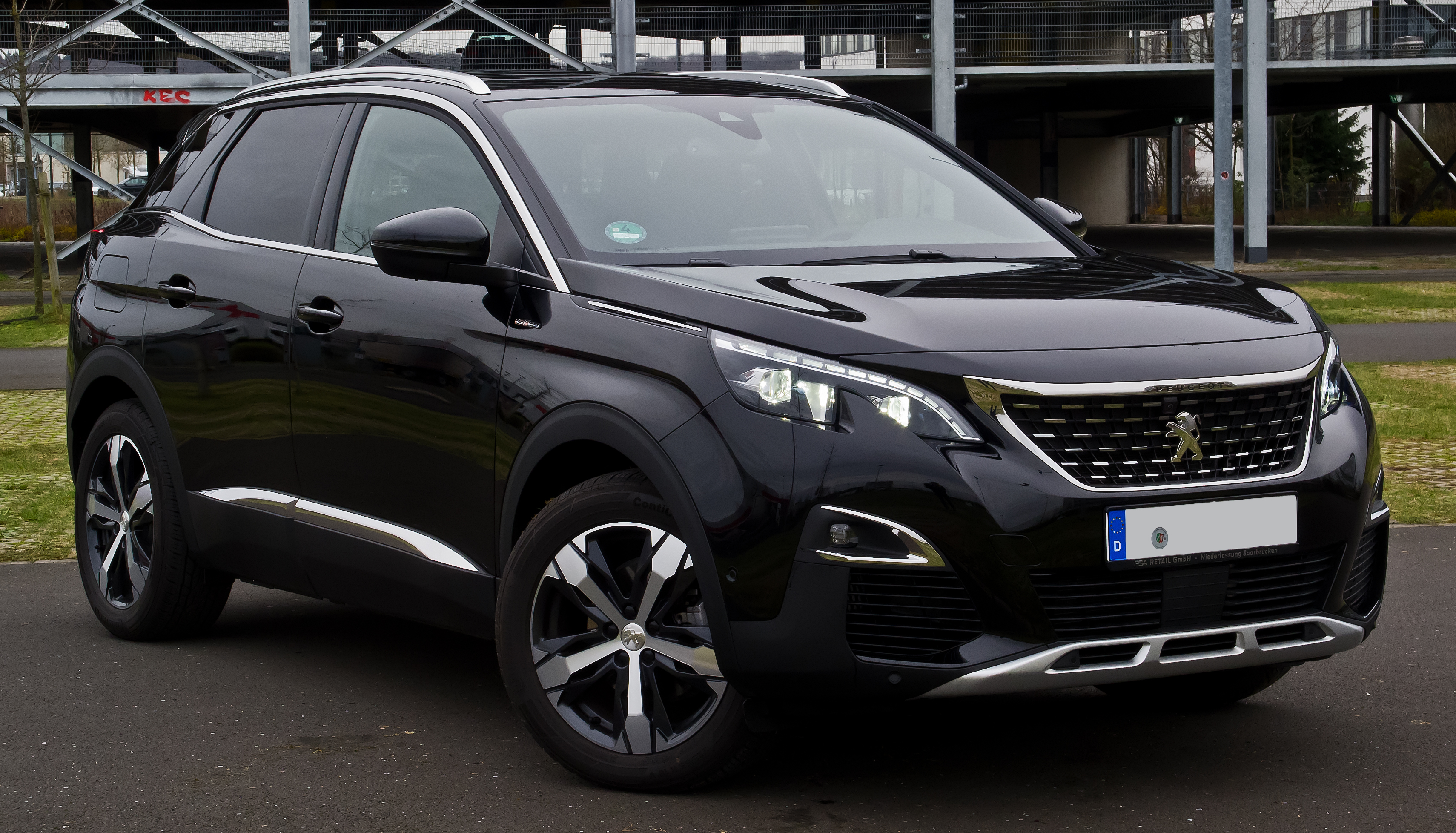 Peugeot 3008 BlueHDi 150 Allure GT-Line (II)